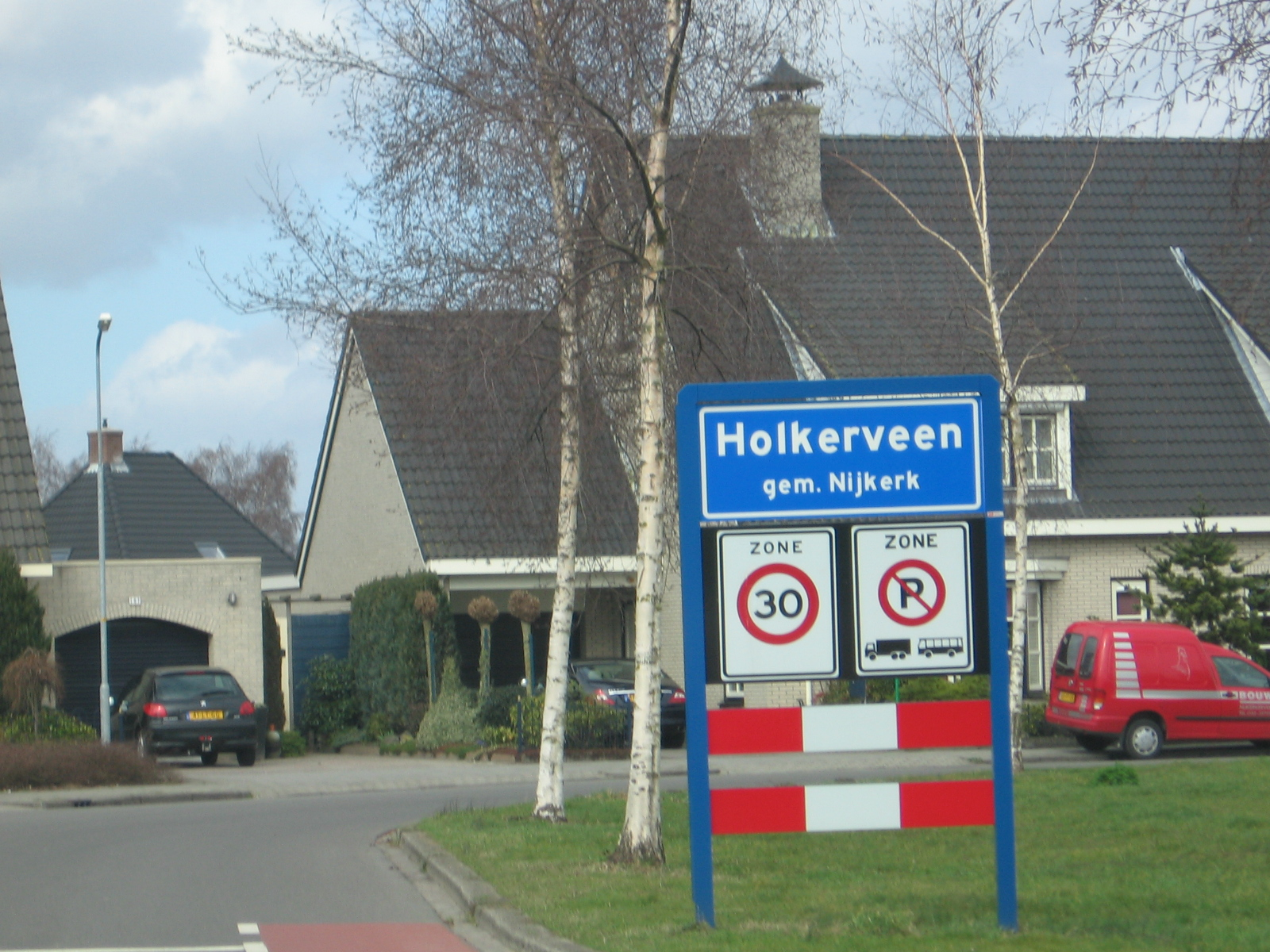 holkerveen